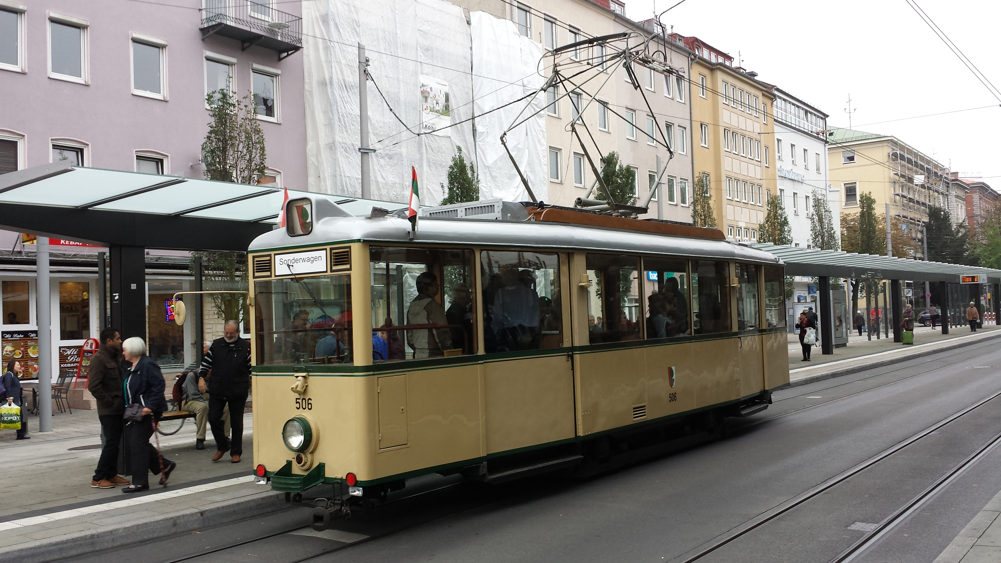 Kriegsstraßenbahnwagen der Straßenbahn Augsburg